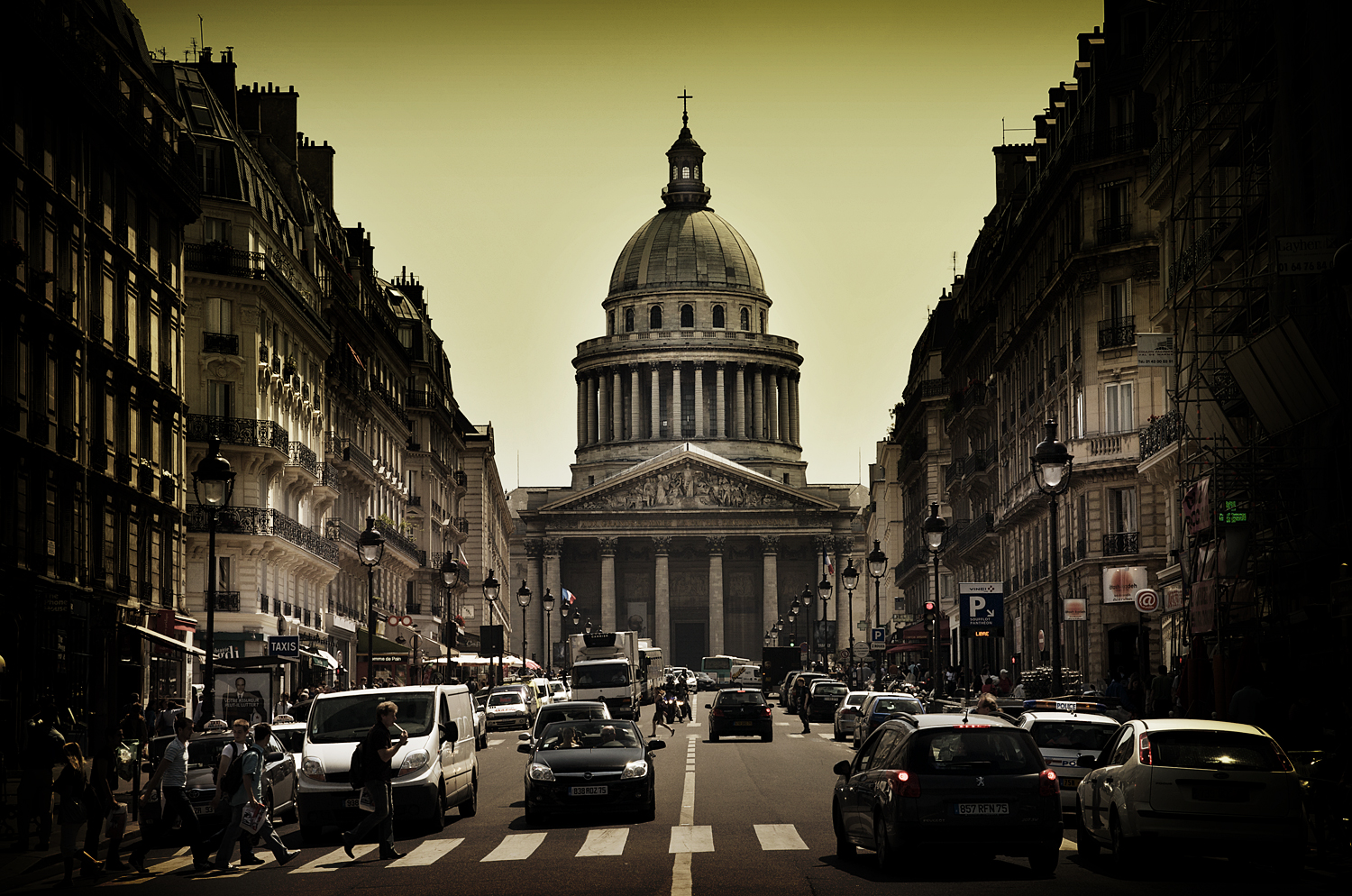 Panthéon, Paris